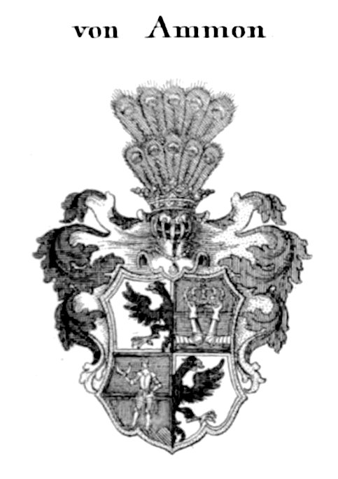 1742 verliehenes Wappen des preussischen Adelsgeschlechts von Ammon